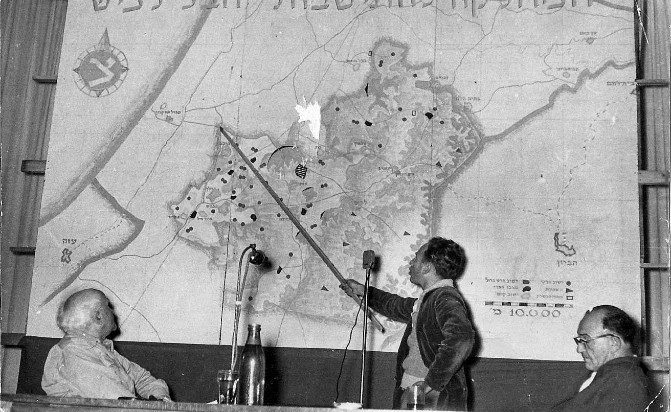 לובה אליאב מציג לפני בן גוריון ואשכול את תוכנית חבל לכיש. התמונה נמצא באלבום תמונות משנות החמישים של משפחת אליאב. עותק מוגדל עד לממדי תמונת קיר גדולה היה תלוי יותר מעשרים שנים על קיר קוביית המגורים הטרומית, שבה התגורר לובה אליאב בניצנה עד יומו האחרון שם, והיא נשמרת שם עד היום, כמו כל חפציו ורהיטי הקוביה.